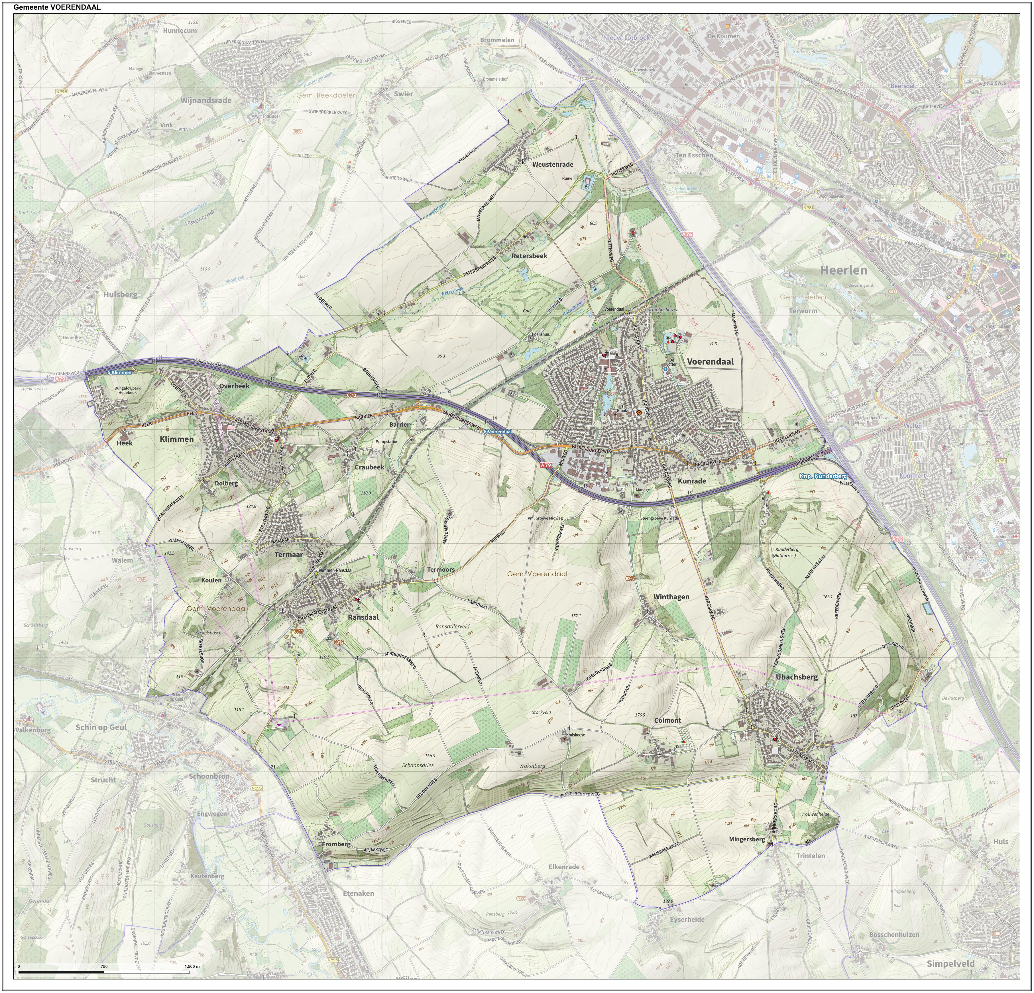 Topografische gemeentekaart. Resolutie: 400 pixels/km. Kaartbeeld samengesteld uit de open geodata van de Top10NL en Top25namen (Kadaster), Creative Commons-BY licentie. Gebouwvlakken uit open geodata BAG extract. Wegen uit de OpenStreetMap, OpenStreetMap community. Reliëfschaduw uit de Actuele Hoogtekaart AHN2. Samenstelling en kleurenschema: Jan-Willem van Aalst, met QGIS. Zie ook de Legenda.